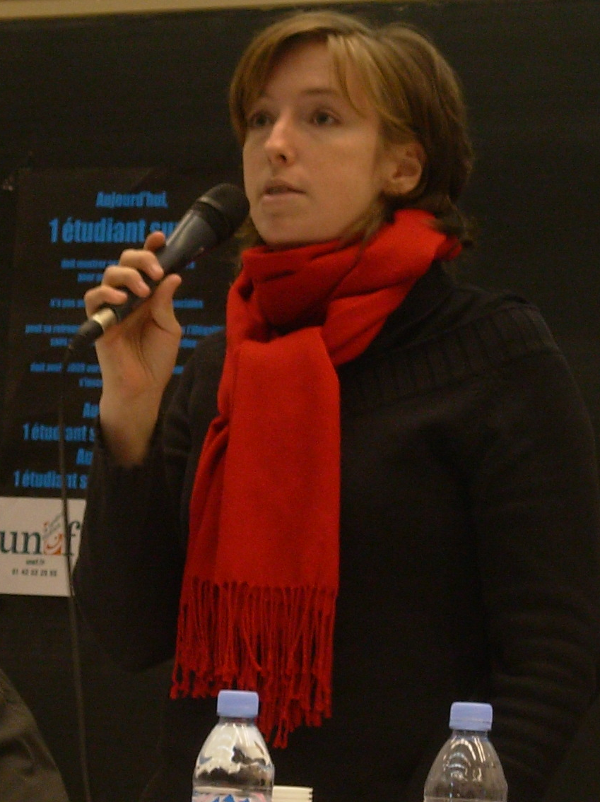 Caroline de Haas en 2006.